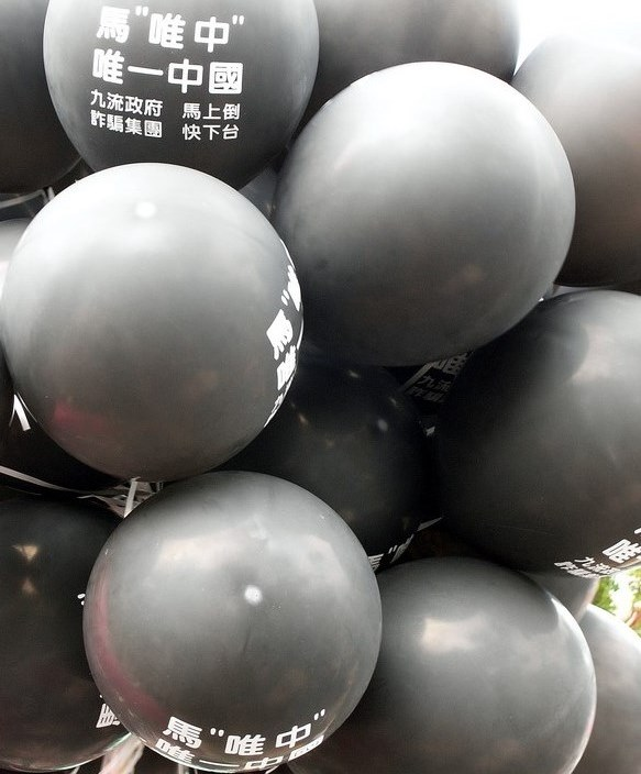 1025反黑心顧台灣大遊行，批評馬英九政府「唯一中國」的黑心氣球。2013年7月30日，前民主進步黨國際事務部主任田欣承認：「在成立近24年的民進黨中，『真正的信仰、價值與政策』正是民進黨所缺乏的。……早期可以以台灣獨立做一個最大公約數，現在只剩下被動的反中、反國民黨、反馬。」2015年5月13日，前民主進步黨中央黨部公共政策研究中心幹事蔡百銓說，陳水扁總統任內採納新潮流系「強本西進」造成台灣經濟傾中，「幸賴馬英九力挽狂瀾而未更加沉淪」。